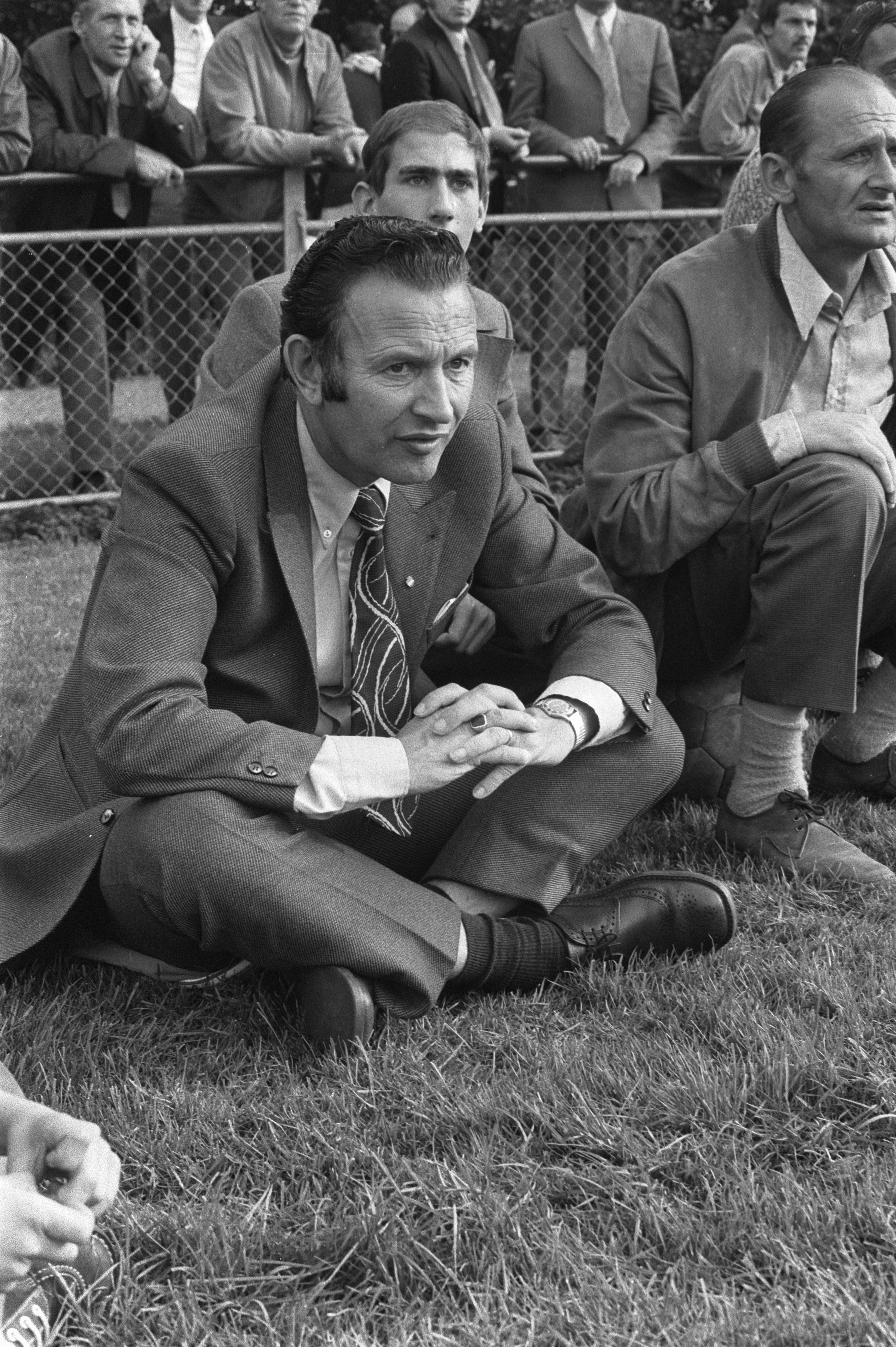 Collectie / Archief : Fotocollectie Anefo Reportage / Serie : [ onbekend ] Beschrijving : Voetbal Oud Internationals tegen Oud Amsterdam 1-0, Abe Lenstra zit langs de lijn Datum : 2 oktober 1971 Trefwoorden : sport, voetbal Persoonsnaam : Lenstra, Abe Fotograaf : Punt, […] / Anefo Auteursrechthebbende : Nationaal Archief Materiaalsoort : Negatief (zwart/wit) Nummer archiefinventaris : bekijk toegang 2.24.01.05 Bestanddeelnummer : 925-0020